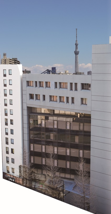 over the sky-tree